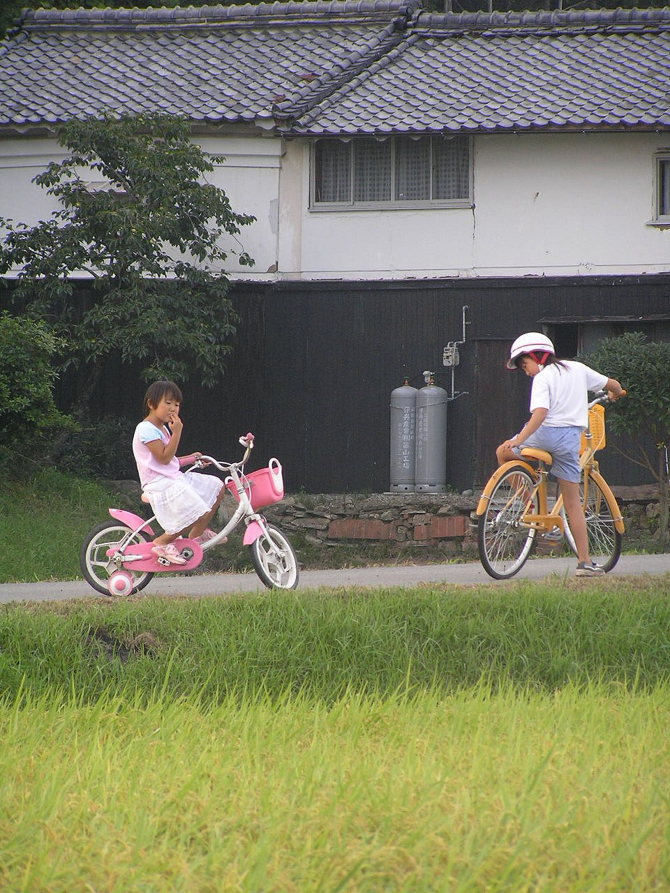 2006，8，19 自転車に乗る兄弟